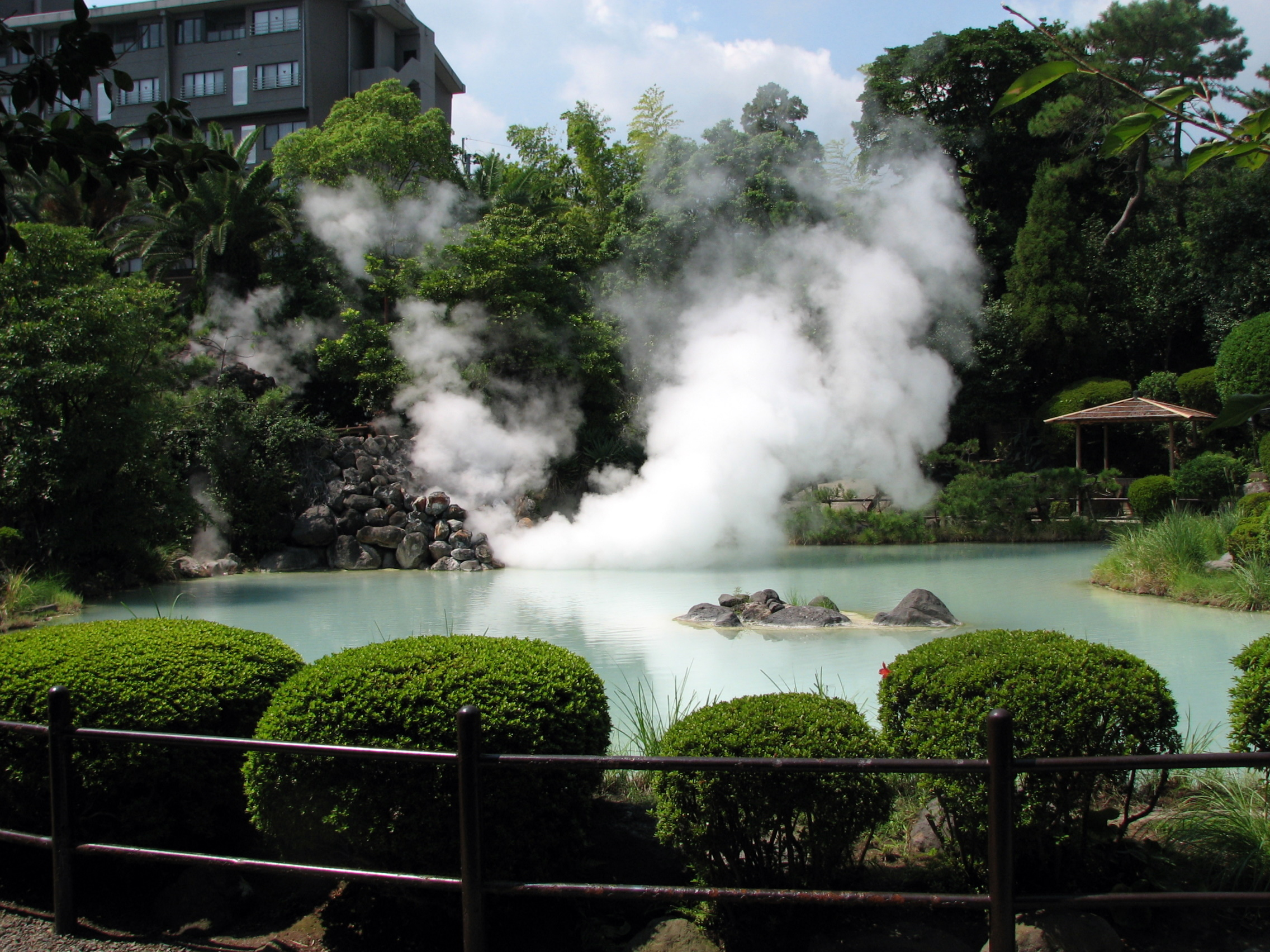 Shiraike Jigoku in Beppu, Oita